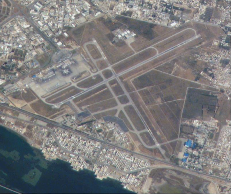 photo aérienne de l'aéroport international de Tunis-Carthage